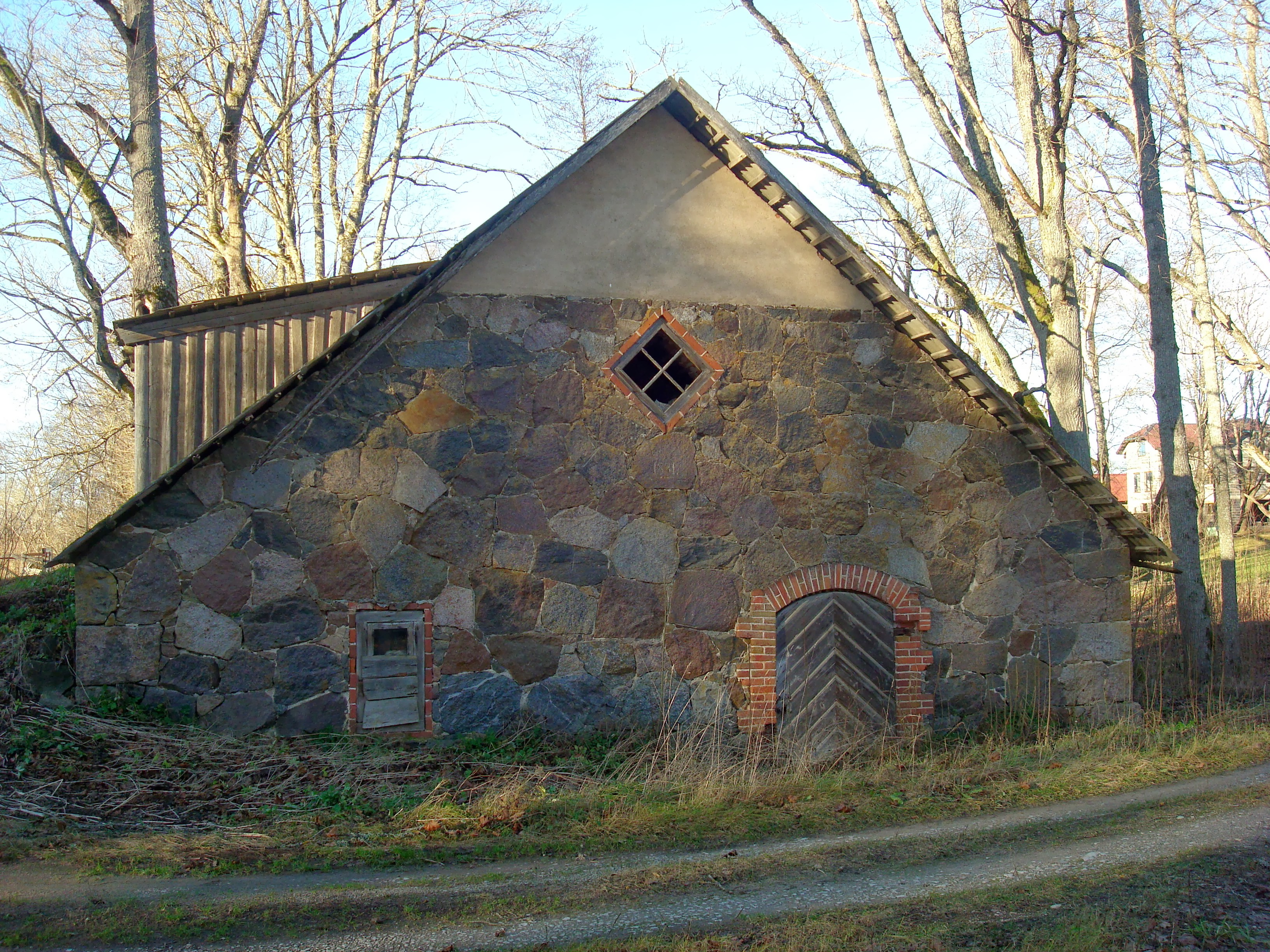 Arakstes muižas klēts